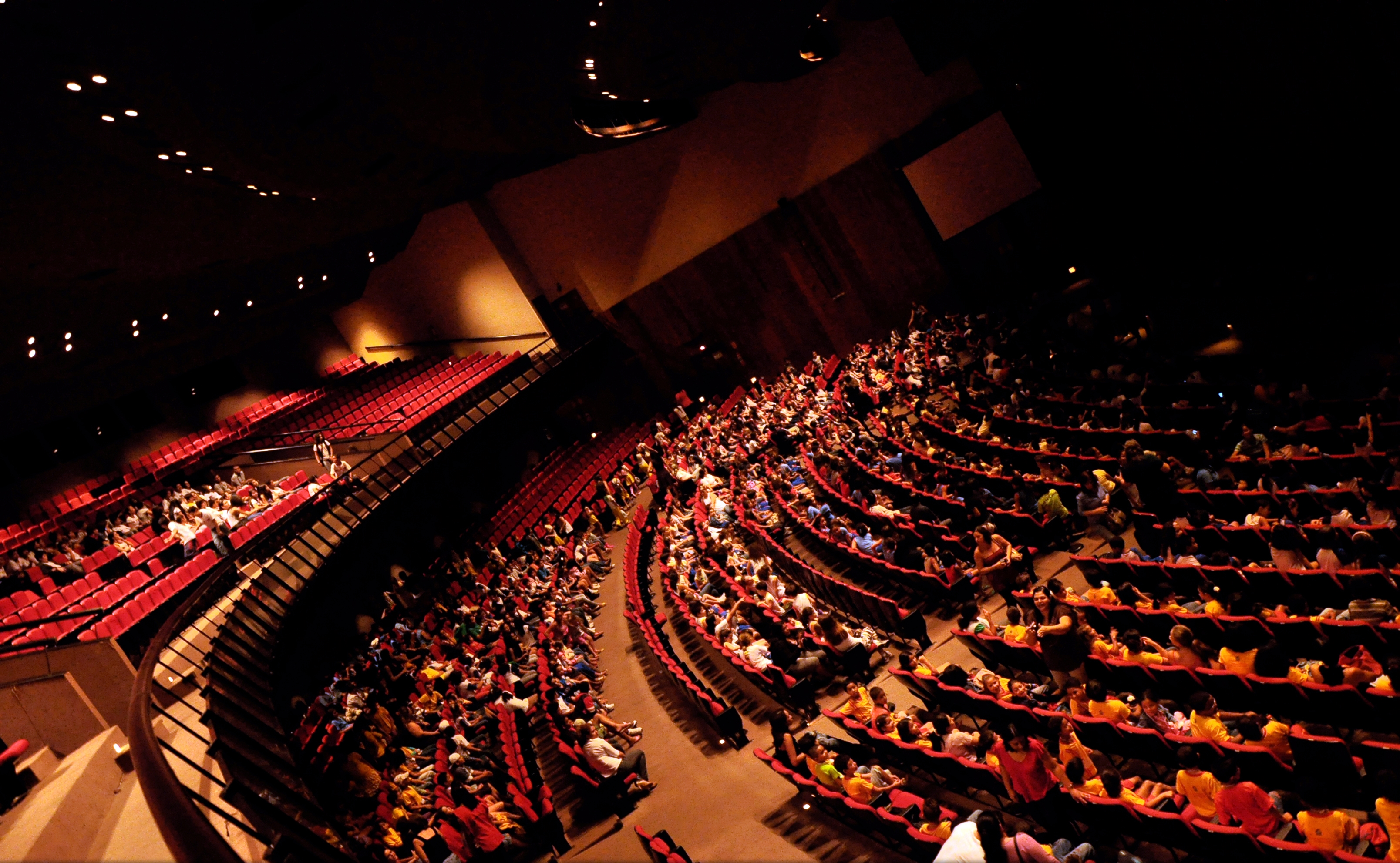 Teatro Rio Vermelho visto de cima, em Goiânia, no ano de 2011.